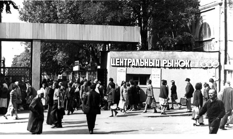 Советское время. Центральный рынок Ростова-на-Дону